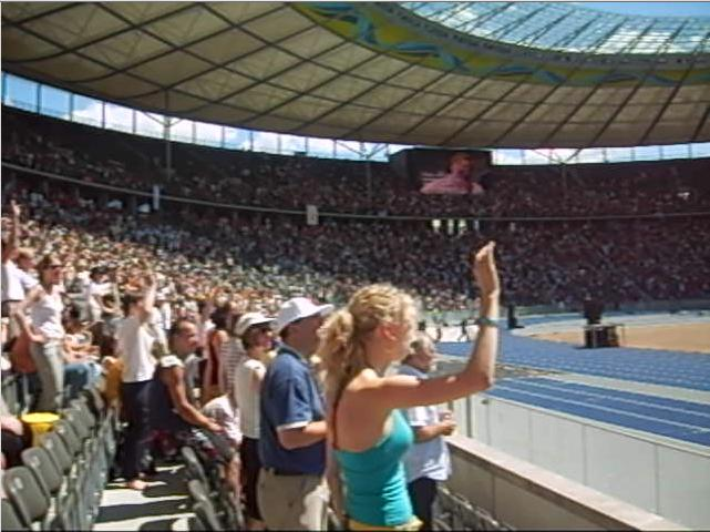 Das Publikum der Veranstaltung Calling All Nations